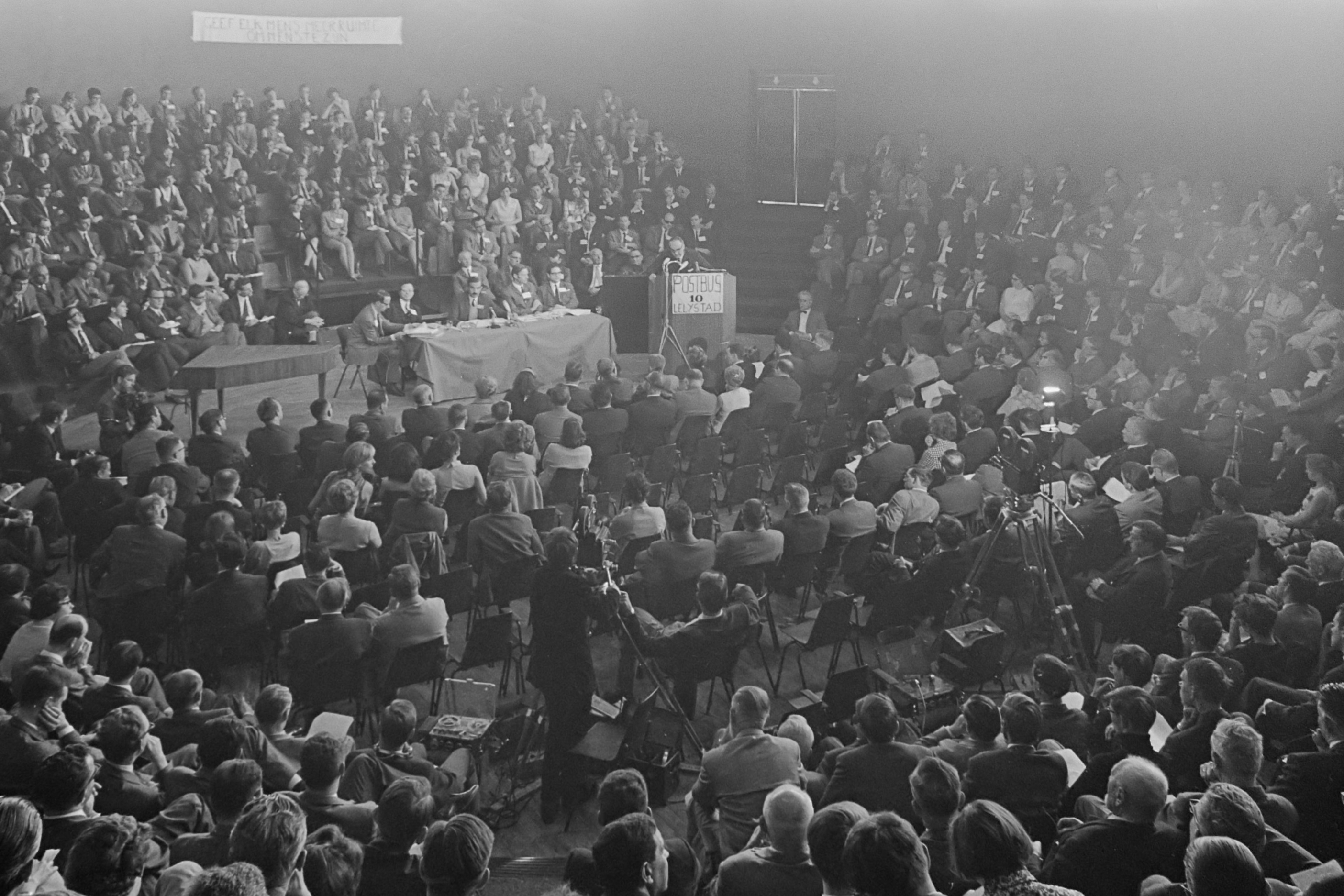 Radicalen PRR vergaderen in Dronten. Overzichten 27 april 1968